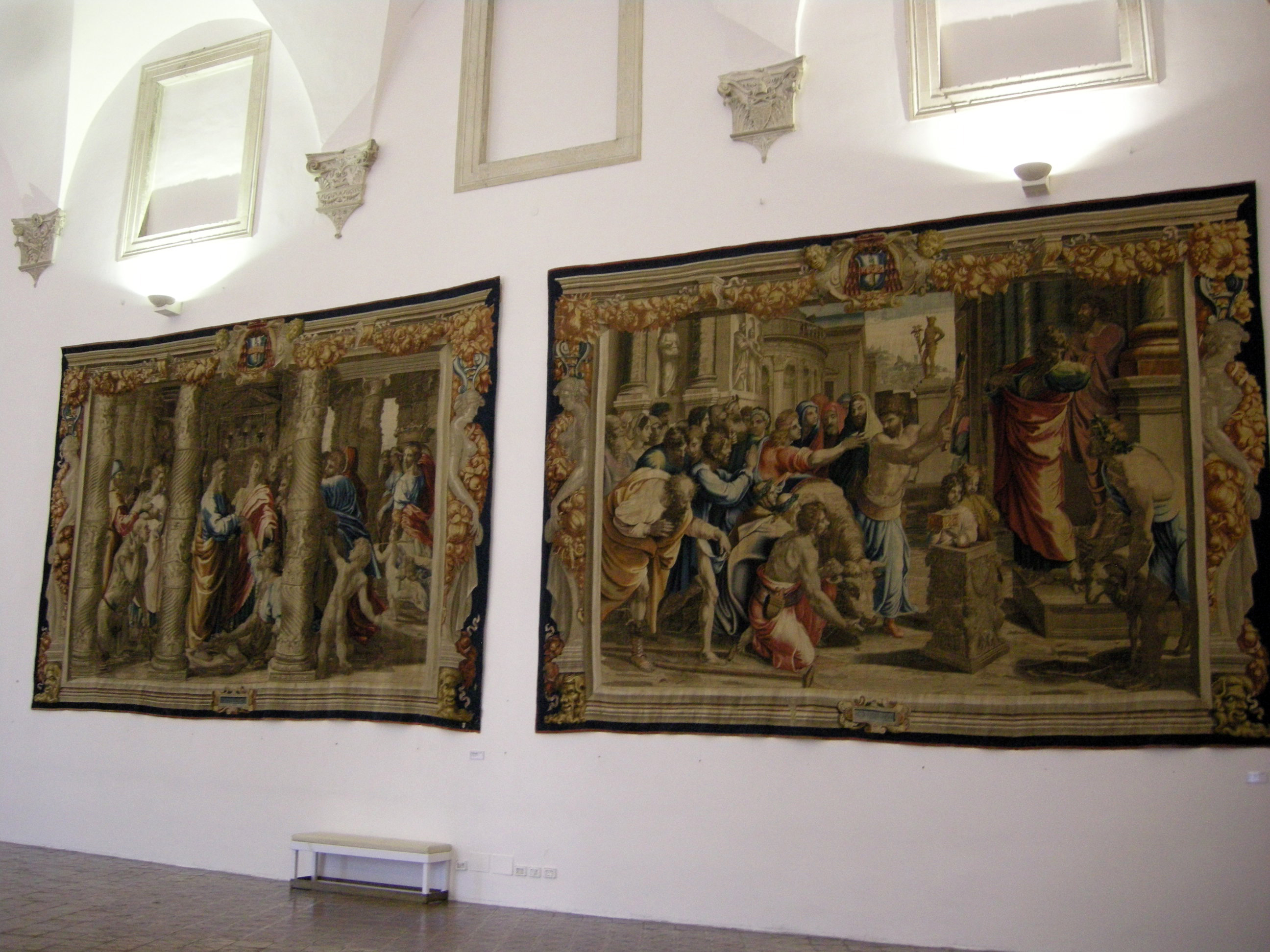 Palazzo Ducale di Urbino - Galleria Nazionale delle Marche - MIBAC This is a photo of a monument which is part of cultural heritage of Italy.